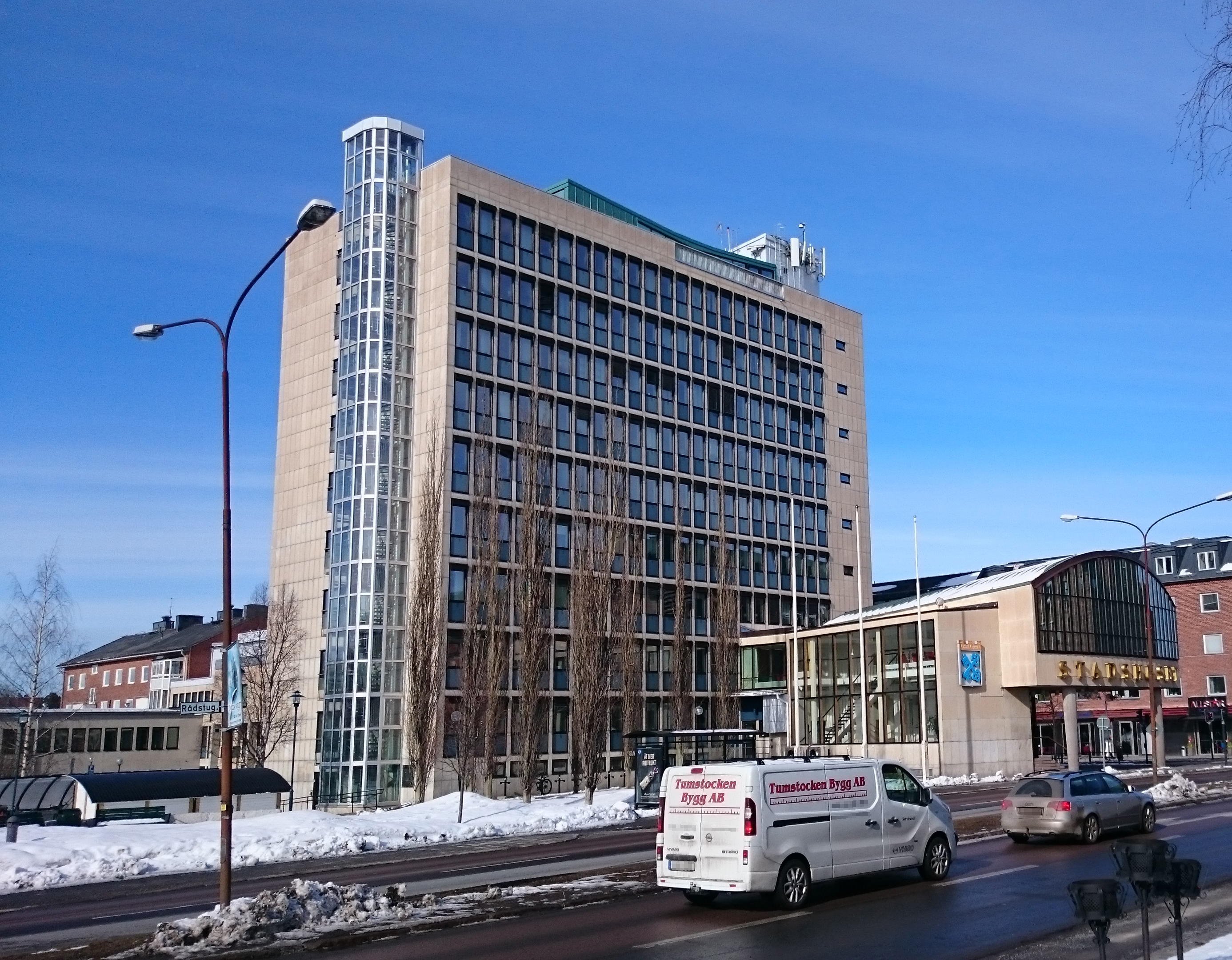 Stadshuset i Luleå - beskärd bild